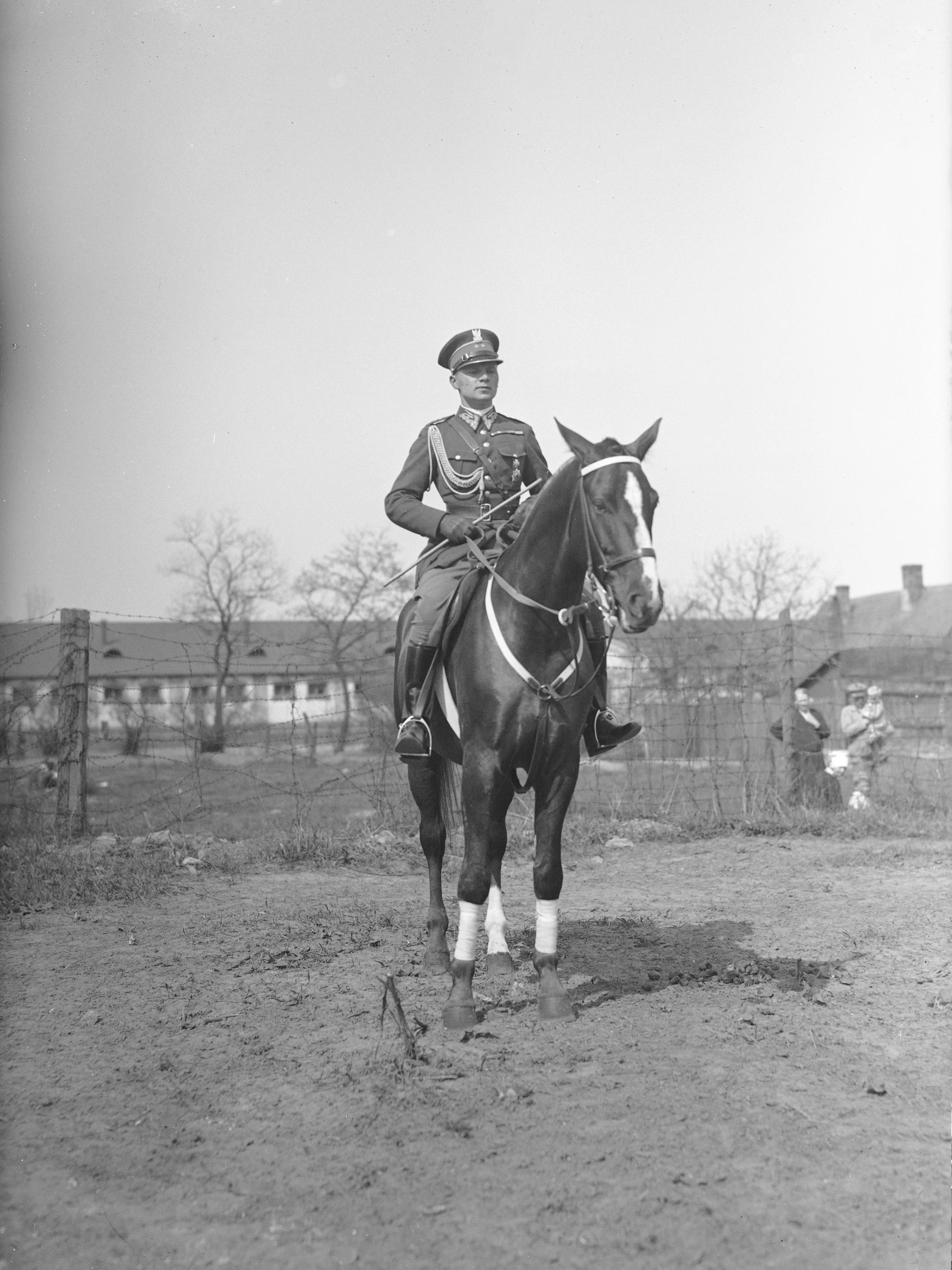 Por. Edward Mańkowski na koniu.